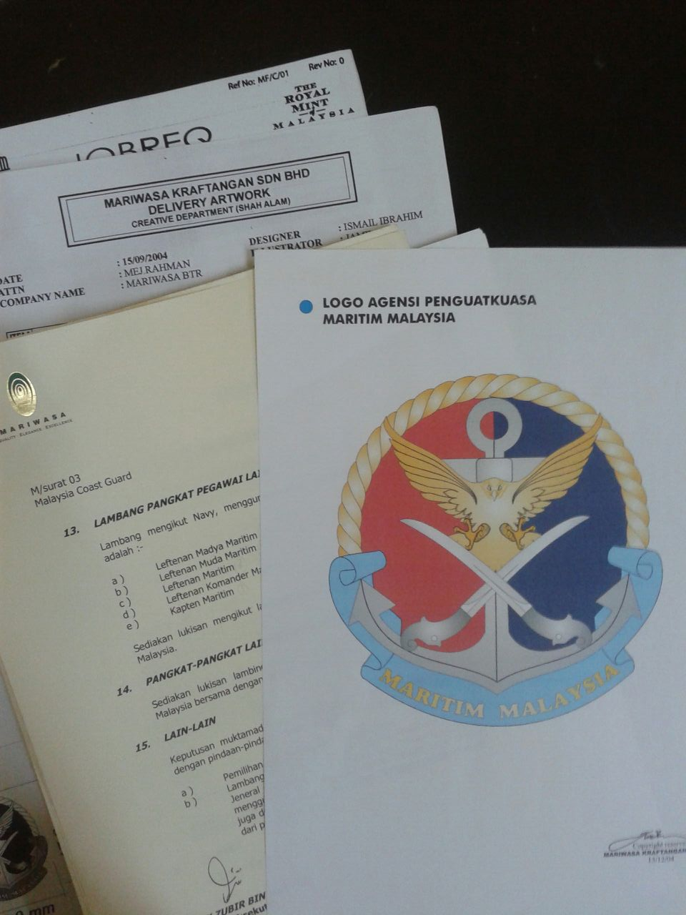 Dokumen asal kertas kerja reka bentuk untuk APMM